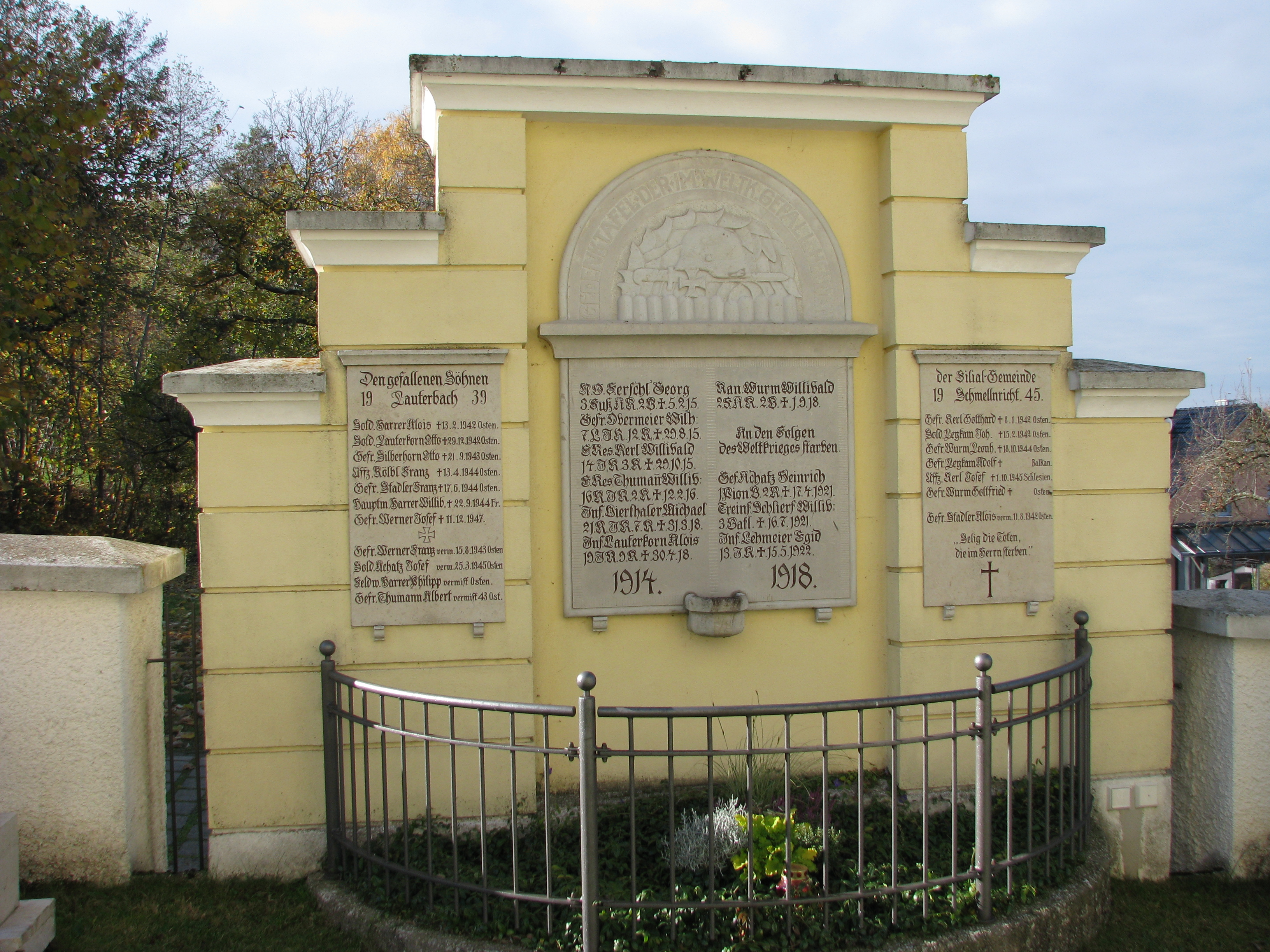 Lauterbach, Ortsteil von Freystadt im Landkreis Neumarkt in der Oberpfalz, Bayern, Kriegerdenkmal im Friedhof